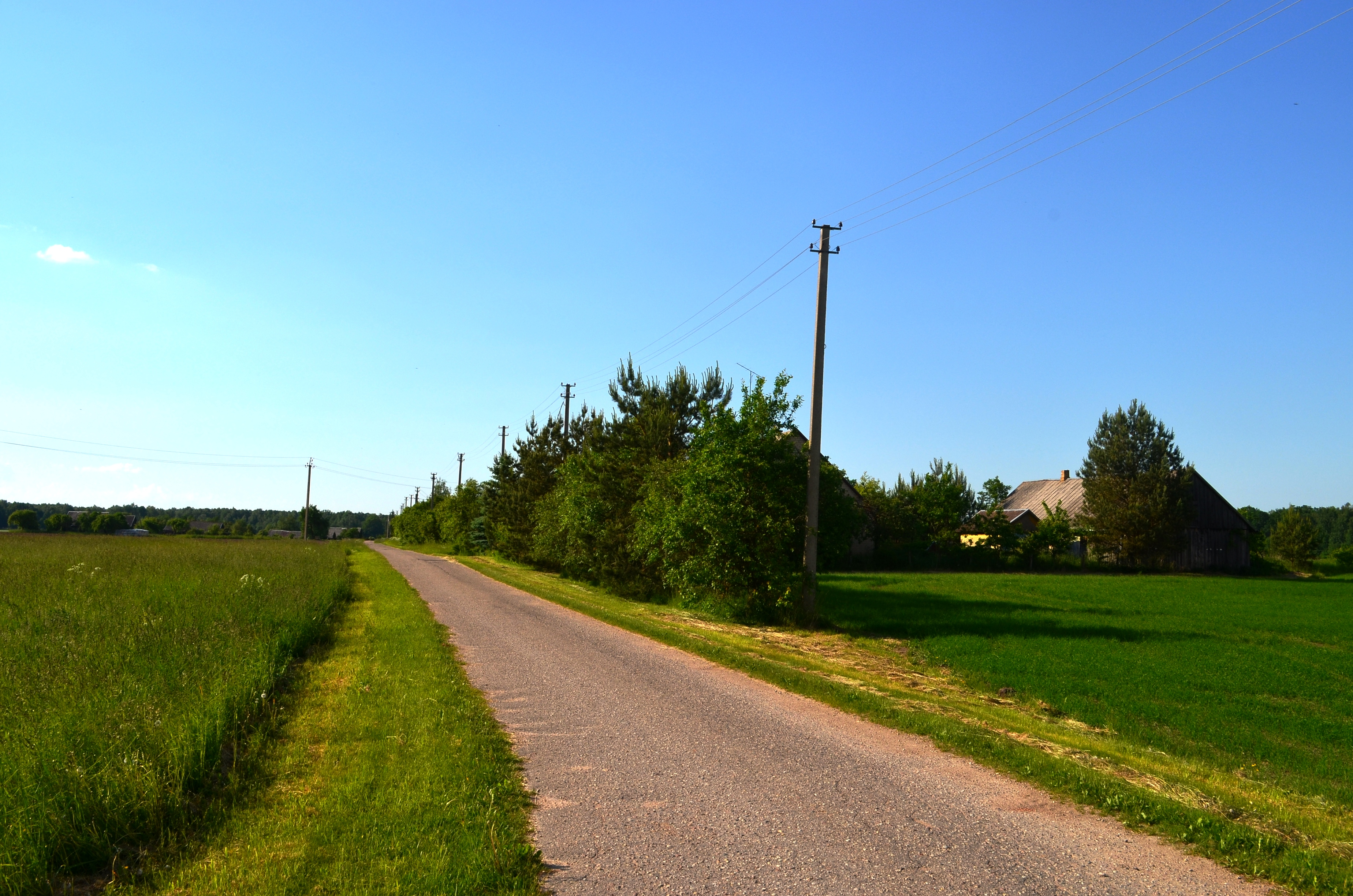 Bajėnai I, Kėdainių raj.